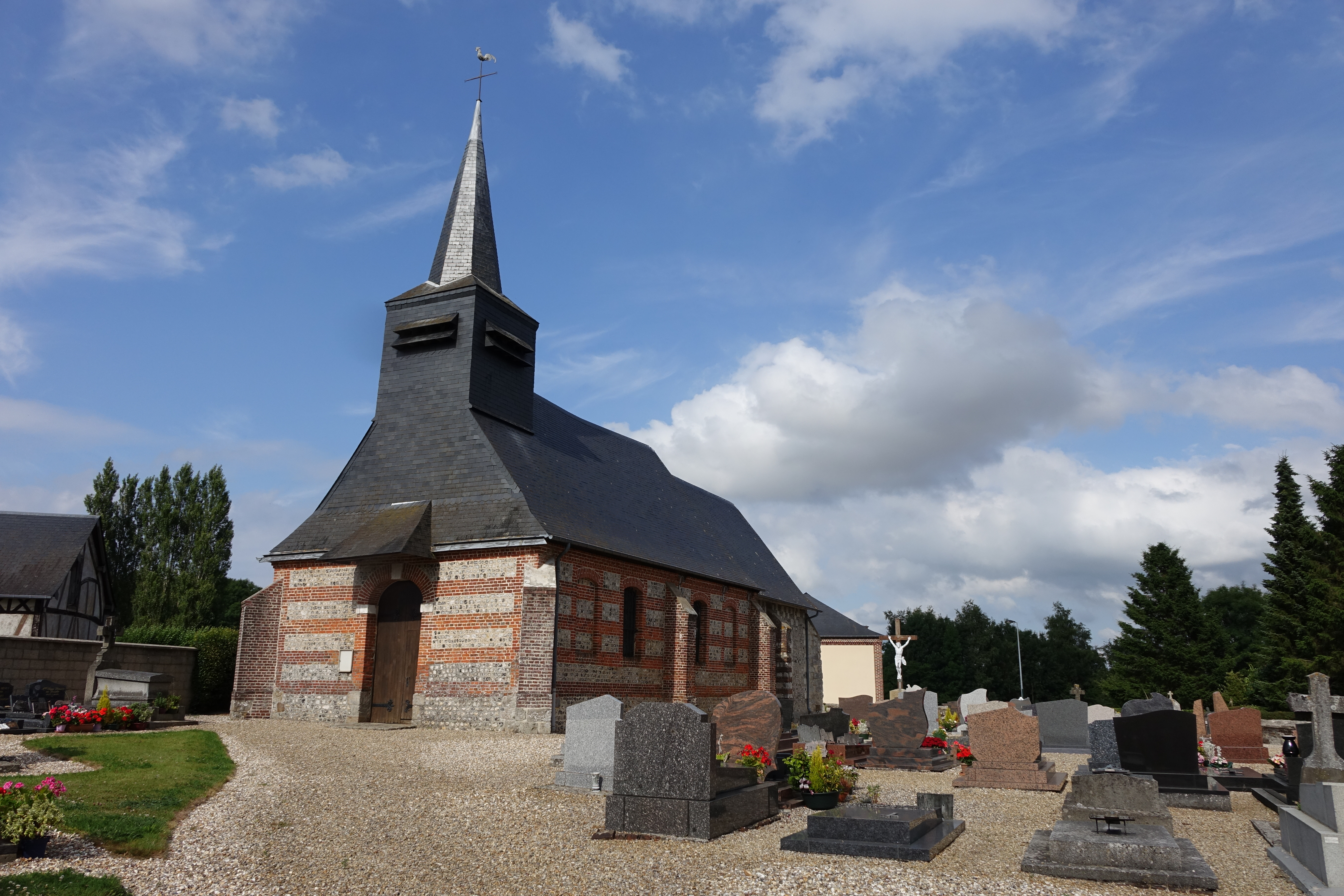 Église Saint-Ouen à Bosc-Mesnil, Seine-Maritime, France